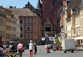 Blick zur Brüderkirche